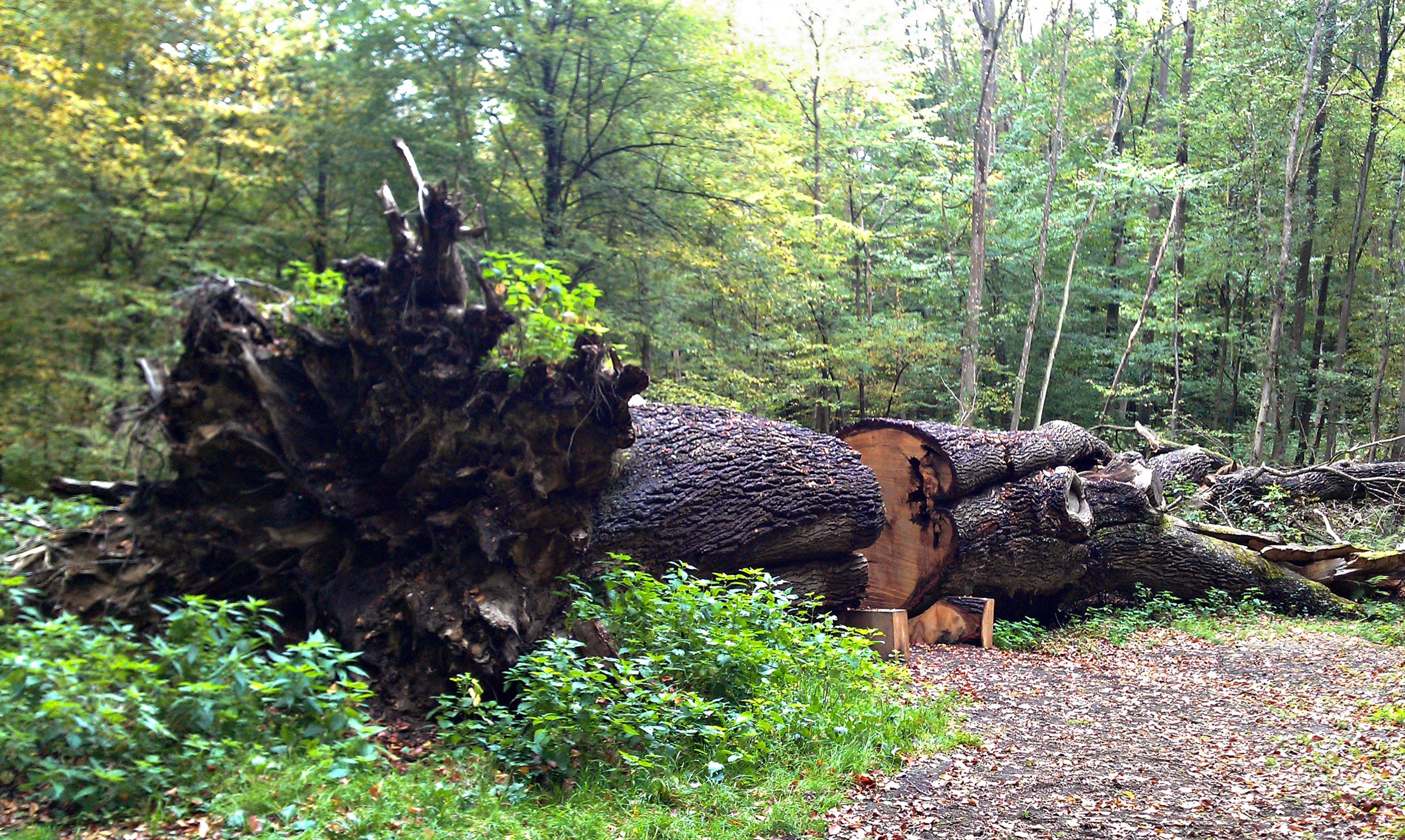 Dicke Eiche im Kottenforst bei Bonn. Laufende Nummer 82 der Liste der Naturdenkmale in der Stadt Bonn.